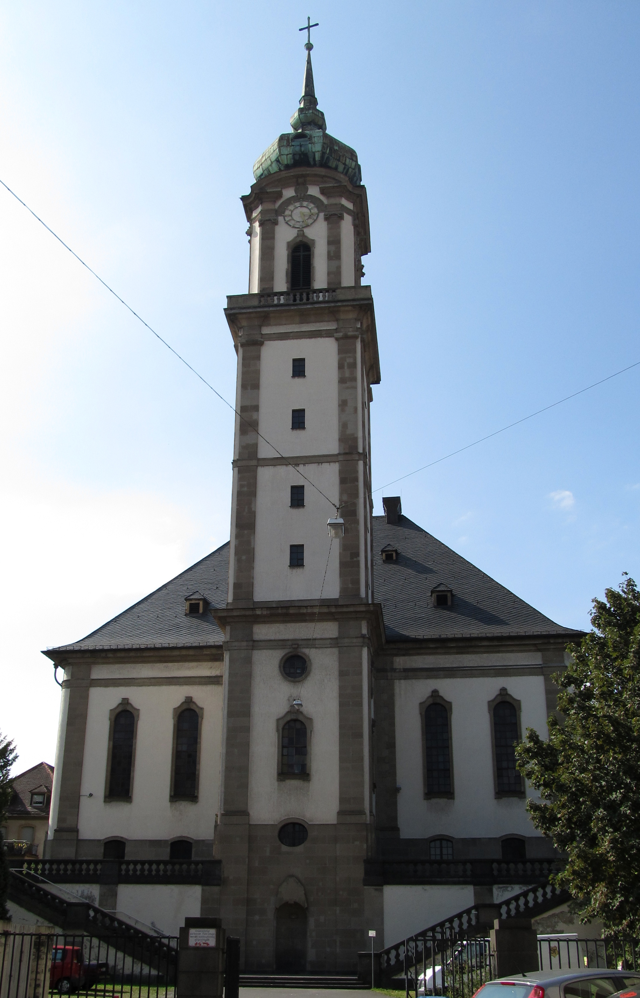 Die evangelische Versöhnungskirche in Völklingen, Saarland